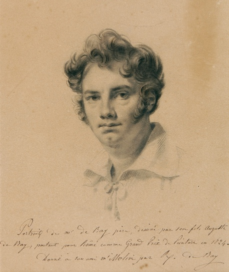 Portrait de Joseph De Bay père